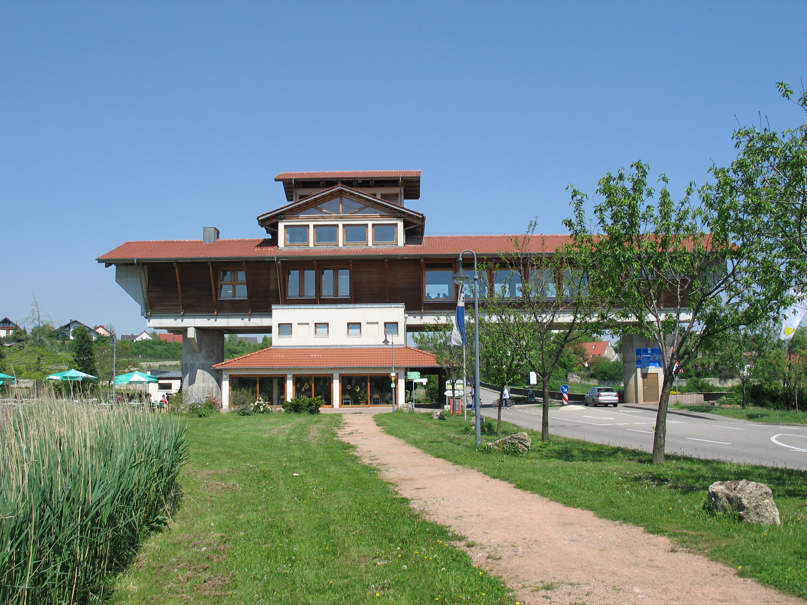 Südansicht des „Hauses der Deutschen Weinstraße“ in Bockenheim an der Weinstraße Fotograf/Zeichner: Offizielles Foto der Verbandsgemeinde Grünstadt-Land Datum: 01.05.2005 Sonstiges: Übermittlung und GNU-Freigabe durch die Verbandsgemeinde Grünstadt-Land, Webmaster Reinhold Pfuhl, mit e-Mail vom 28.02.2006. Hierin wird auf die Genehmigung des Leiters Organisation und Finanzen, Wolfgang Gassen, Bezug genommen.